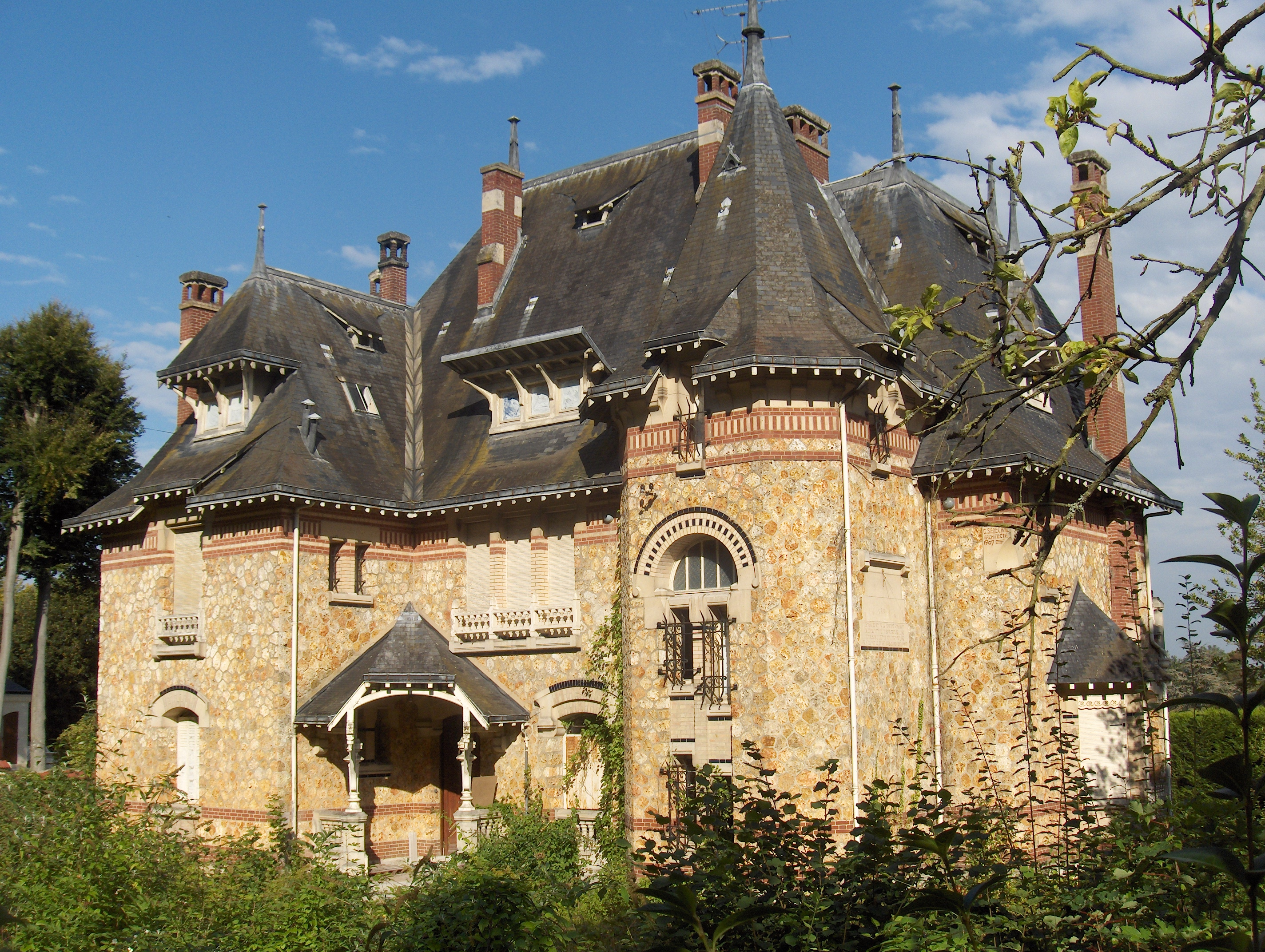 Demeure de 1907, dite la Sirène, en pierre meulière (Parmain, Val-d'Oise), vue de l'arrière